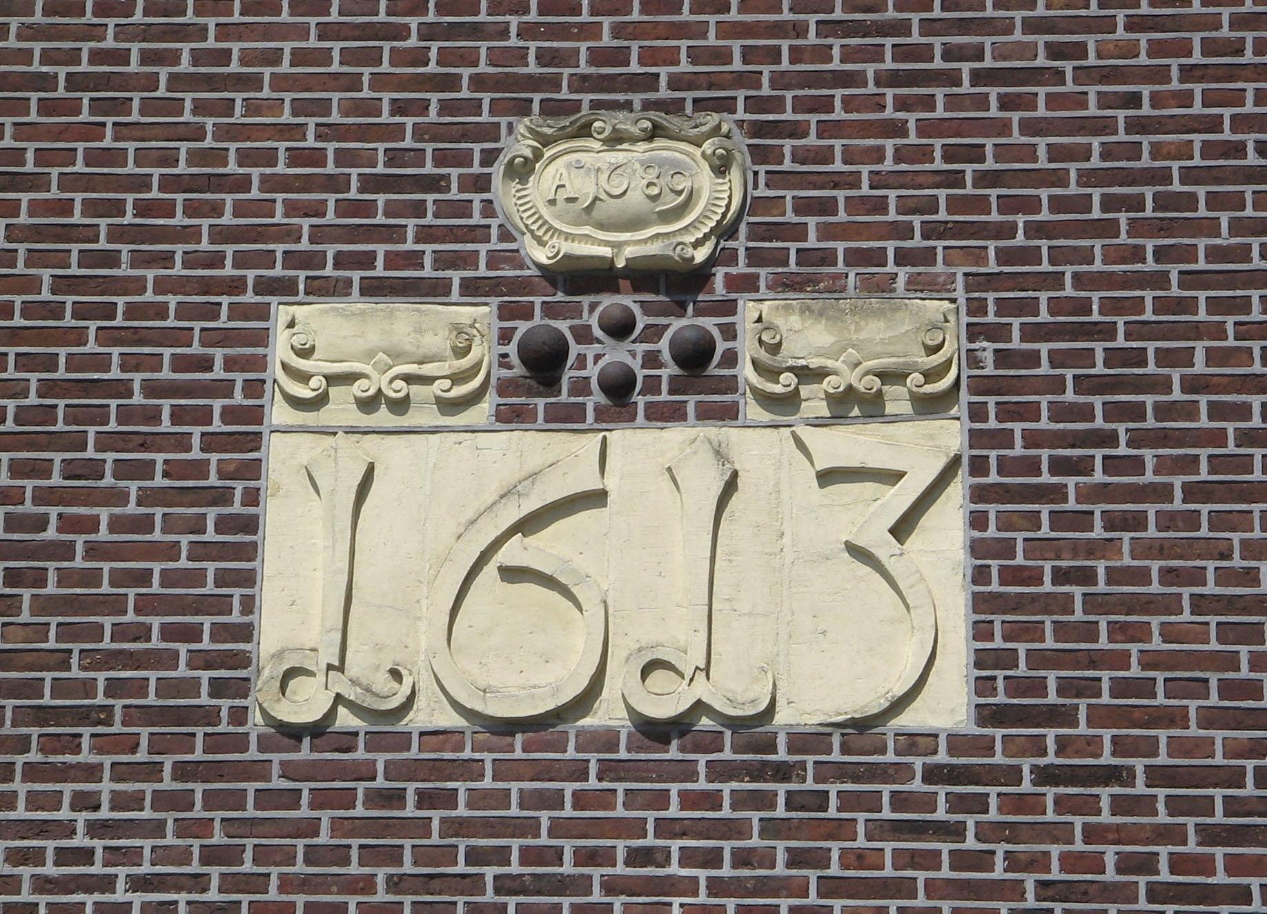 Kapel in 't Zand. Fragmenten noordmuur.